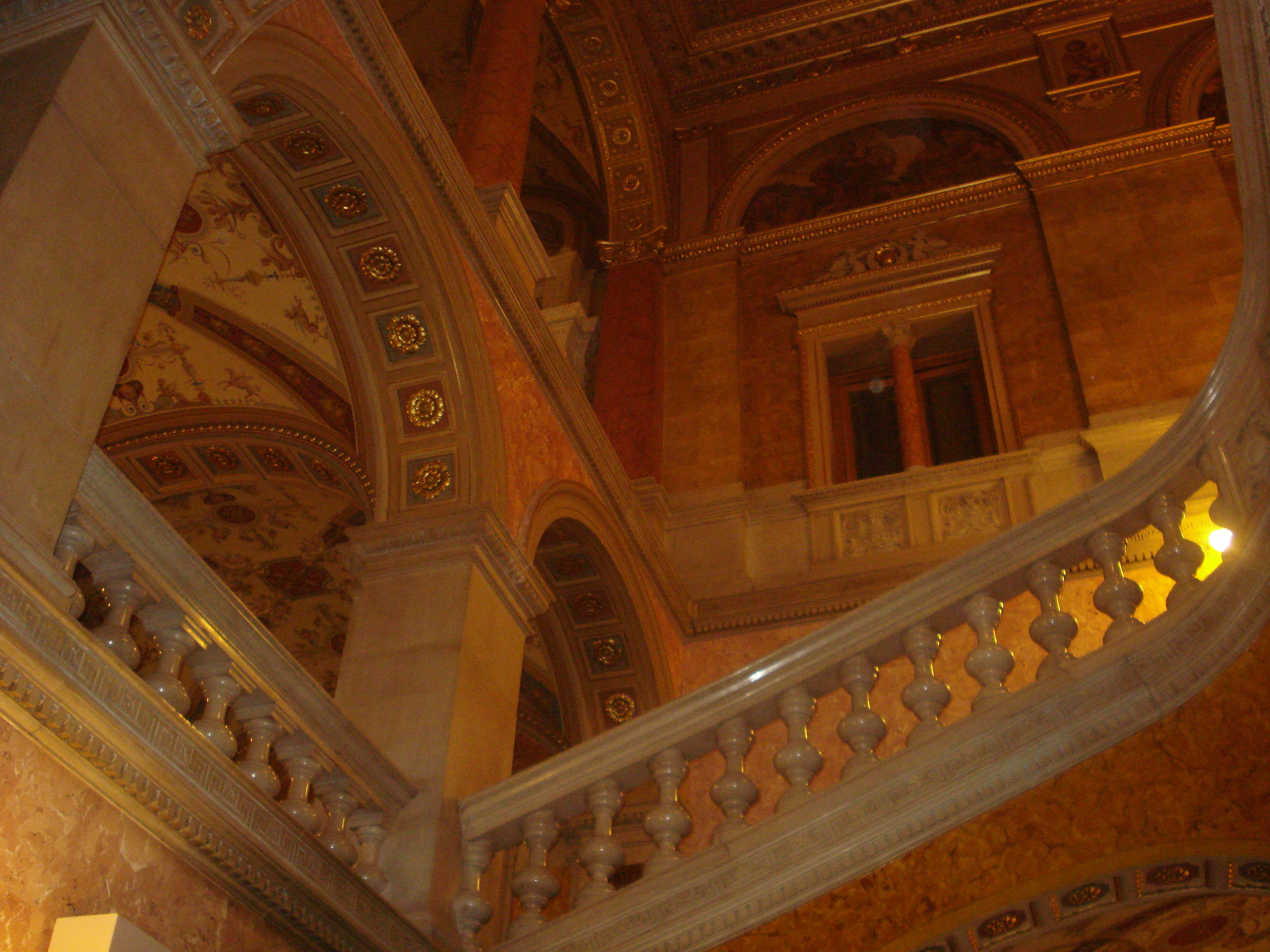 Magyar Állami Operaház Budapest VI. kerület Andrássy út 22. This is a photo of a monument in Hungary. Identifier: 695